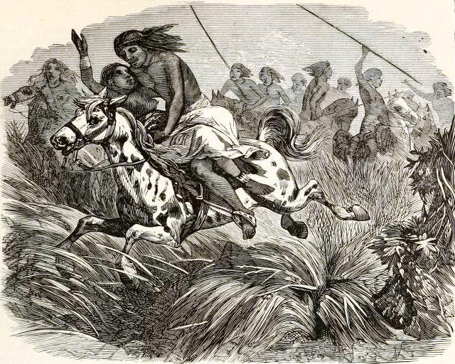 Araucanian Marriage (circa 1871.).